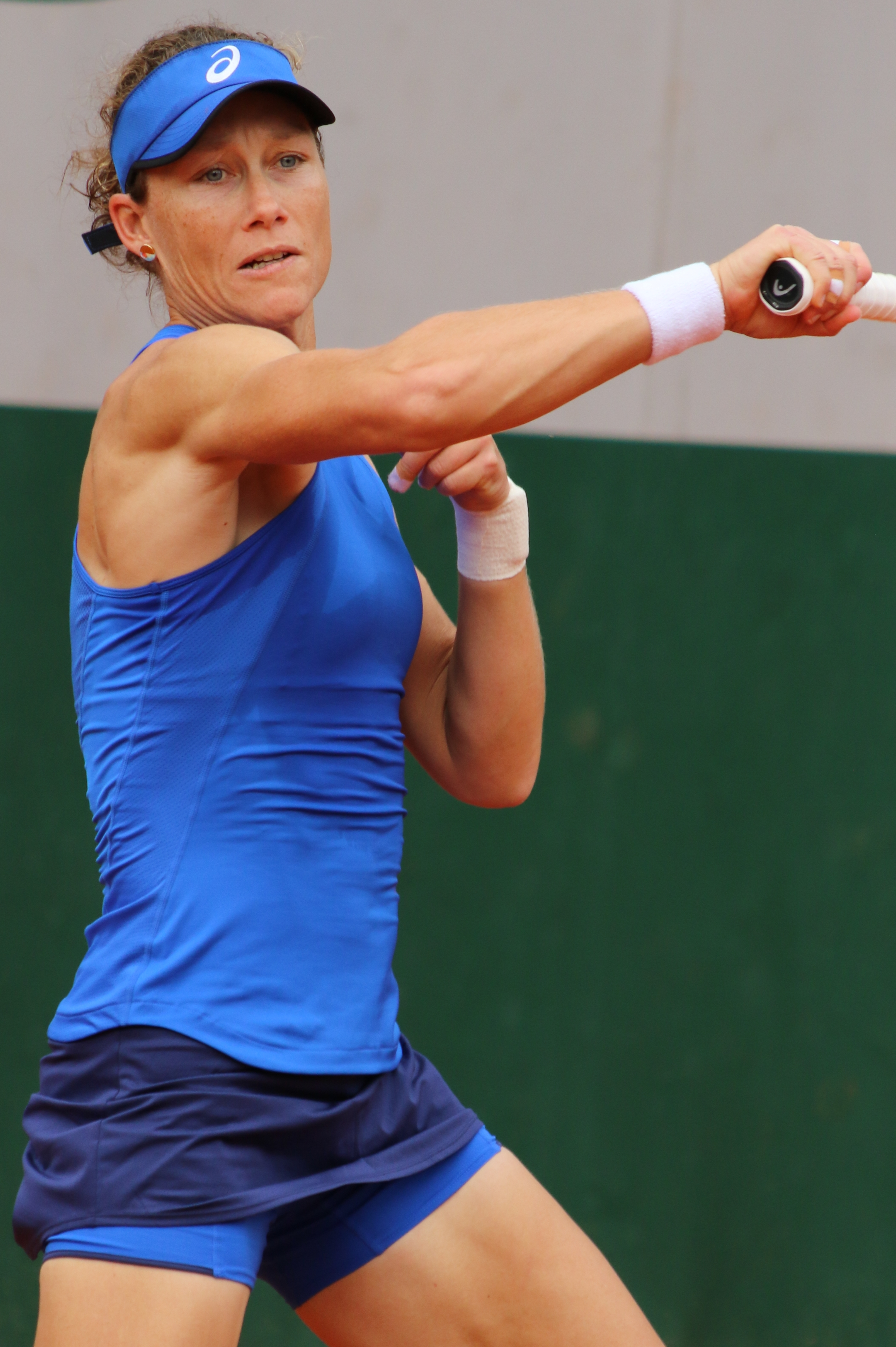 Stosur RG19 (12)